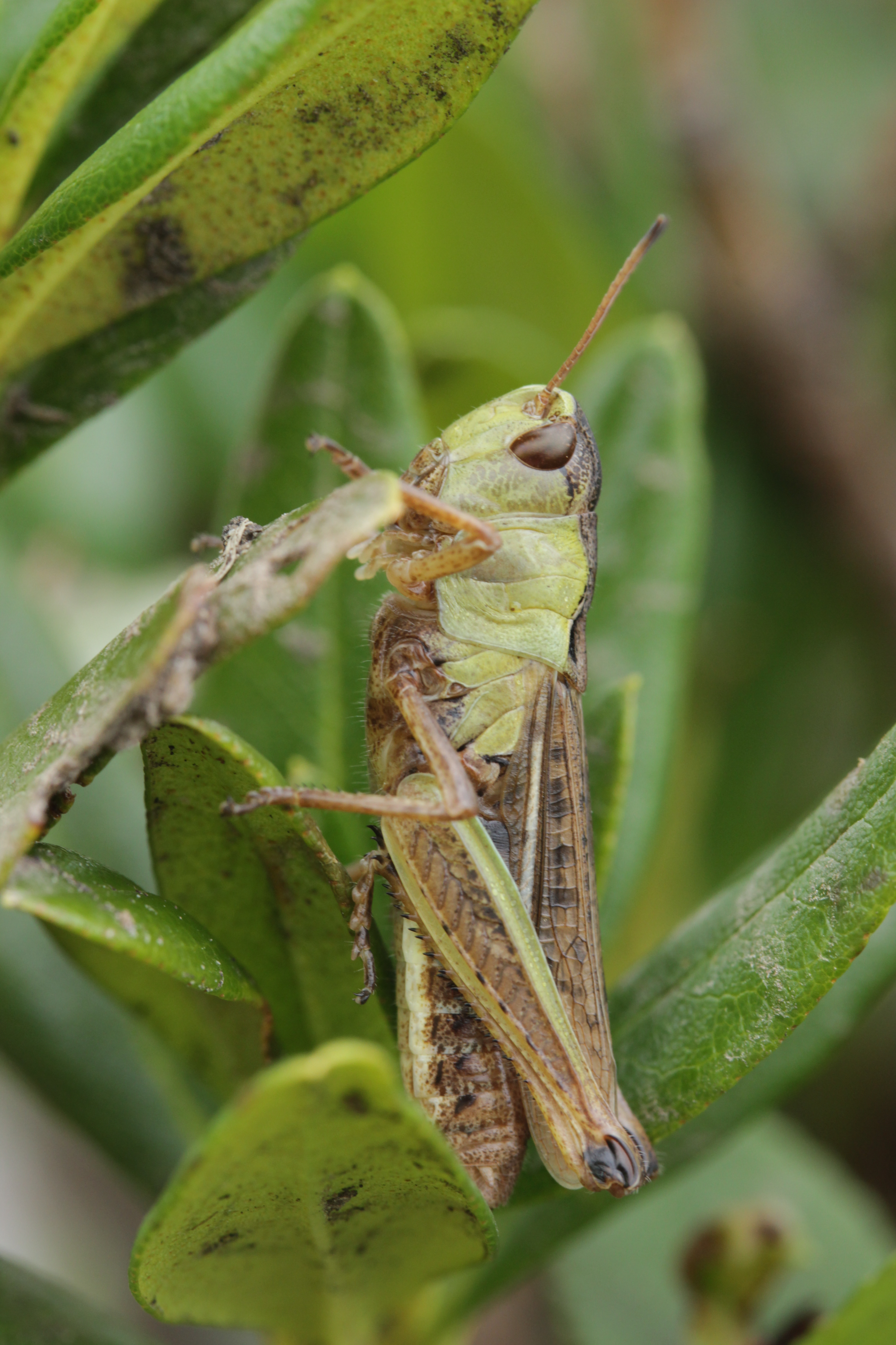 Female Gomphocerus sibiricus